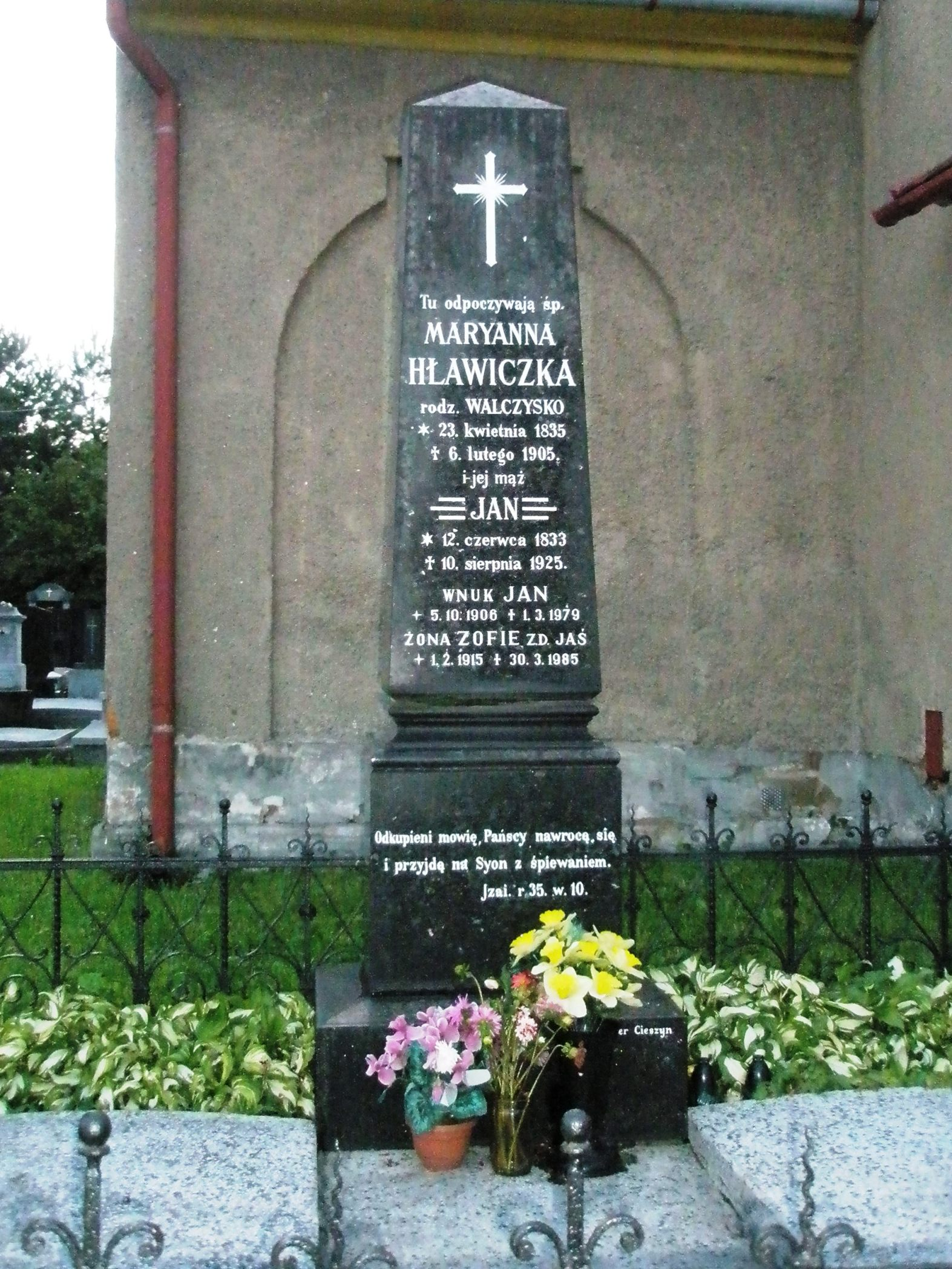 Český Těšín. Horní Žukov. Hrob Jana Hławiczky, st. (1833-1925), starosty Horního Žukova.